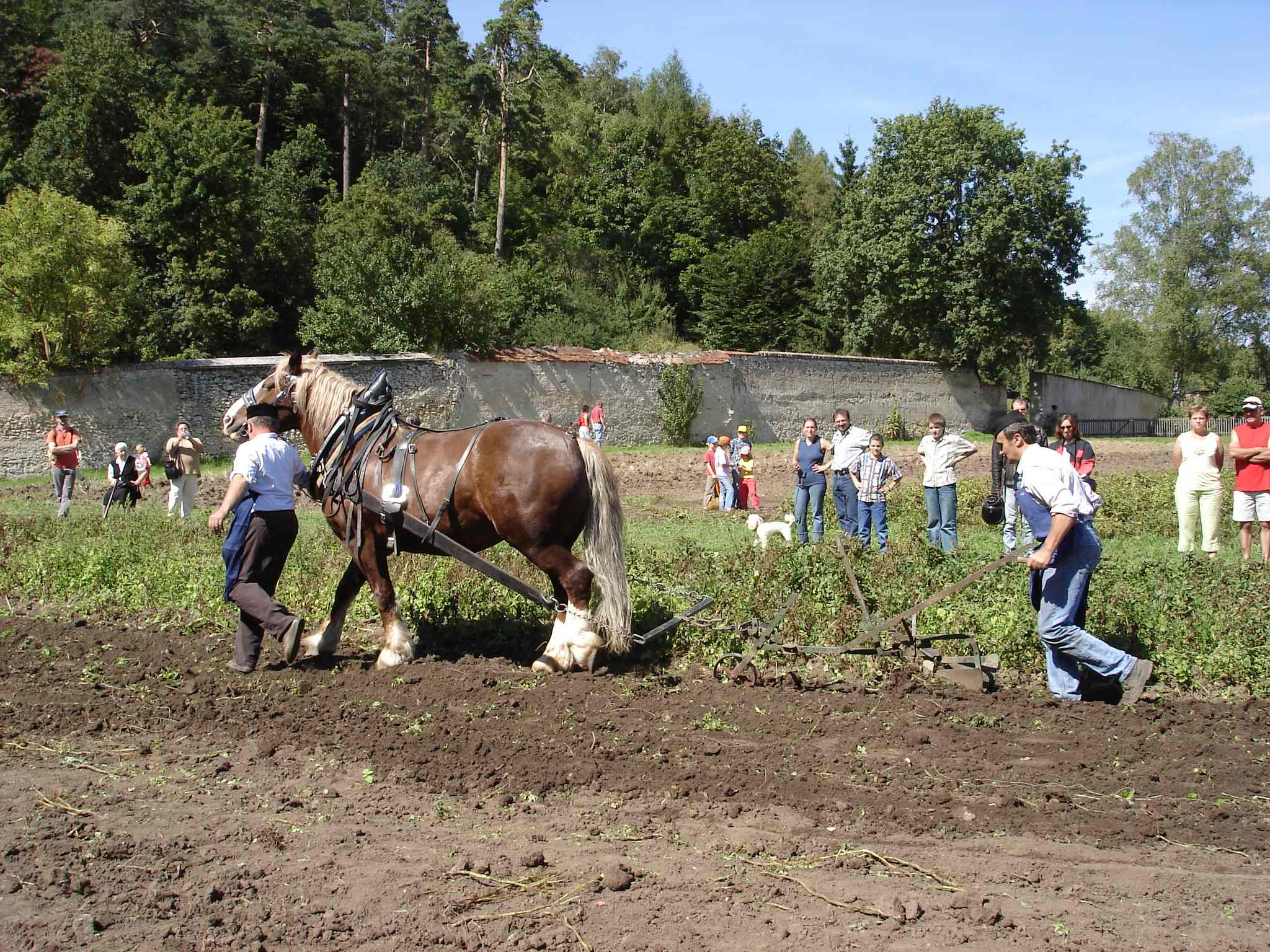 Kartoffelfest 2005 Maihingen